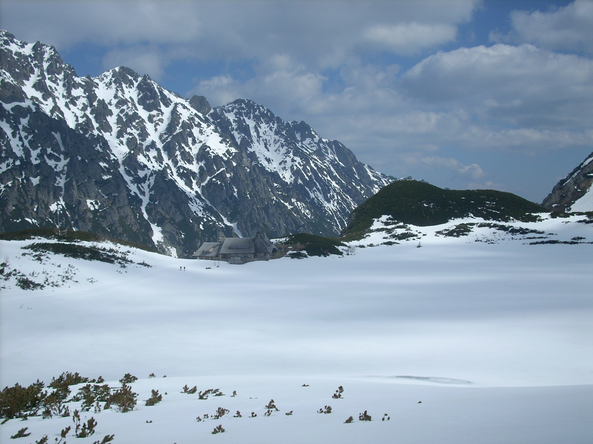 Widok na schronisko w Dolinie Pięciu Stawów Polskich